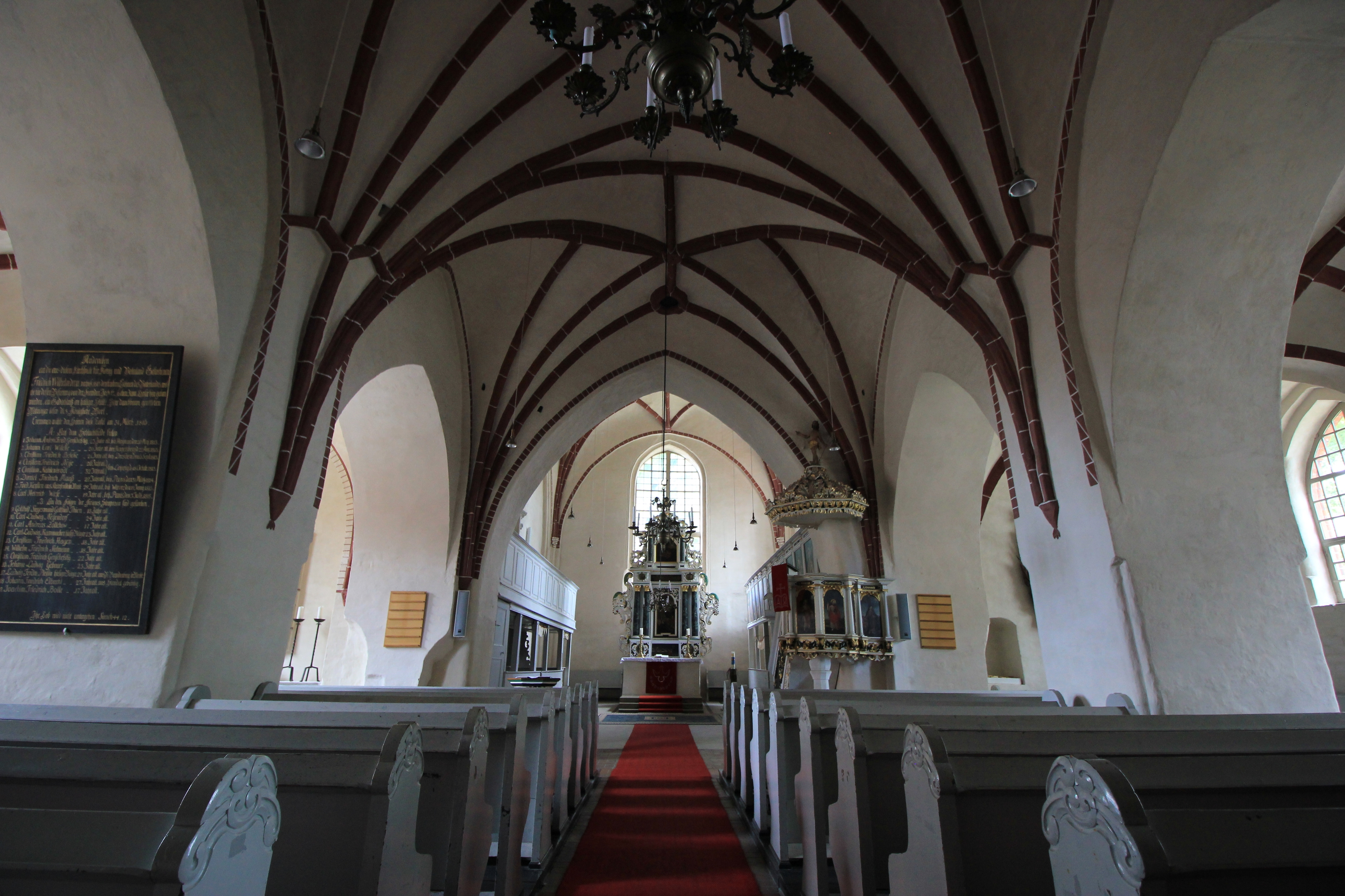 In der Stadtpfarrkirche St. Nikolai in Kremmen, Brandenburg